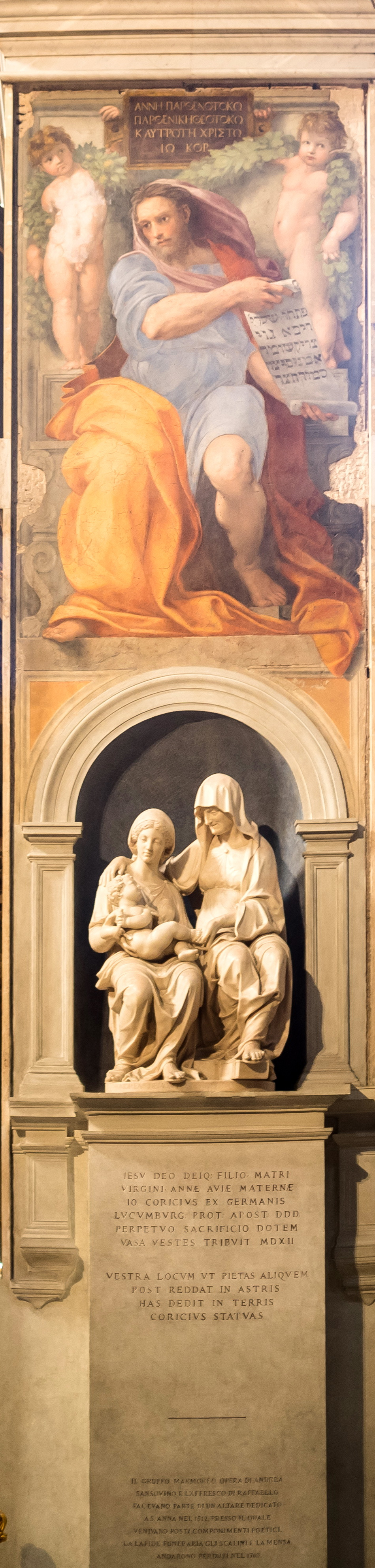 Sant'Agostino (Rom); Hauptschiff 3. Pilaster; Raffael, Sansovino